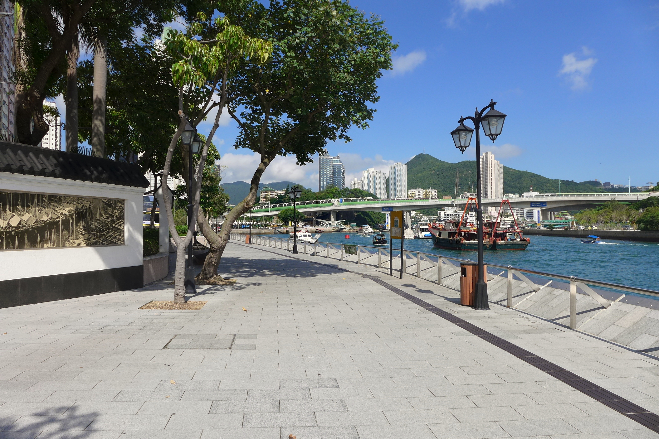 Aberdeen Promenade